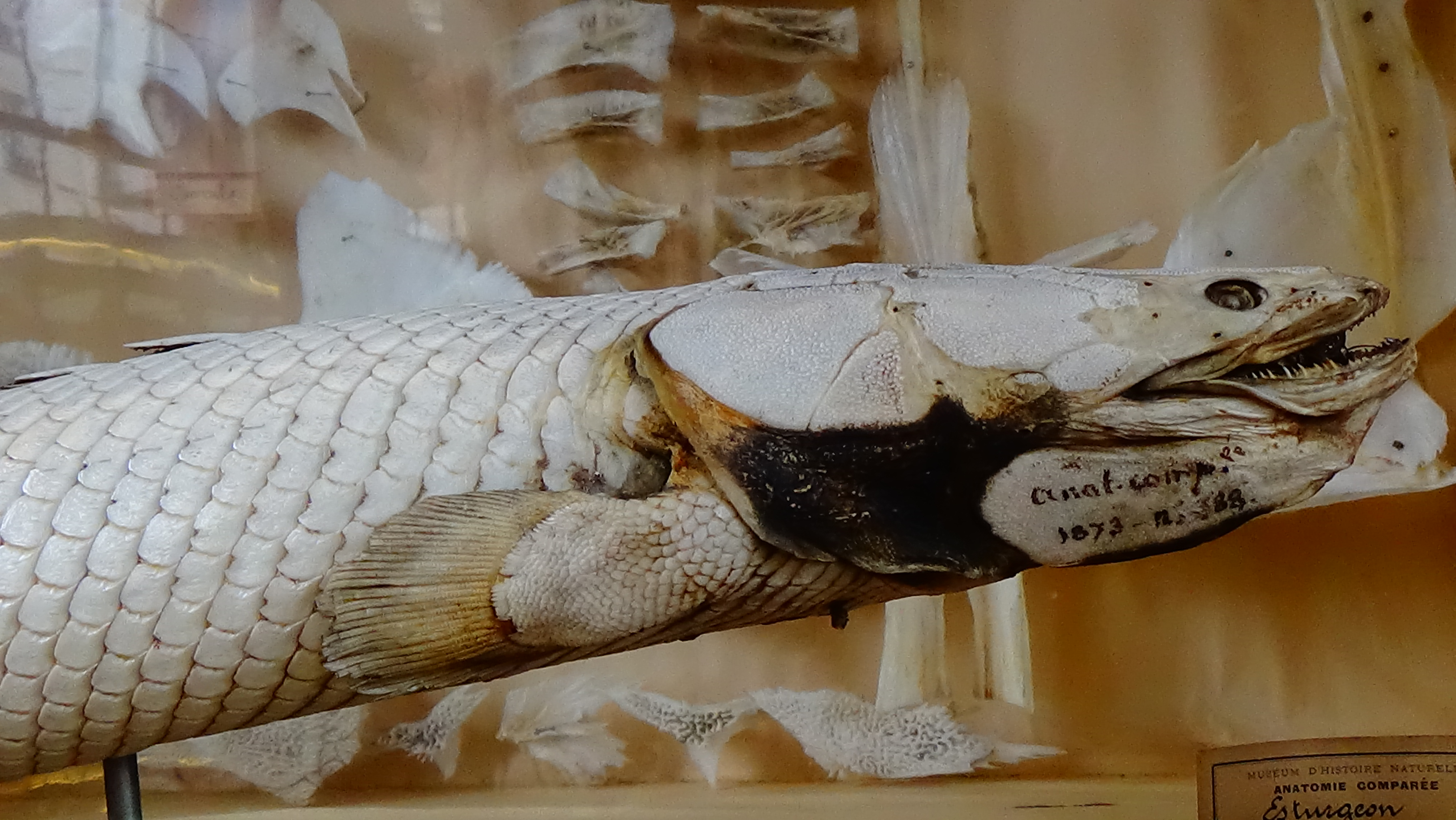 Neoceratodus forsteri - squelette mnhn Paris